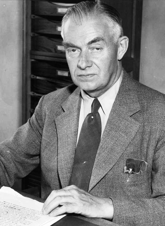 portrett, mann, handelsråd, sittende halvfigur ved skrivebord.